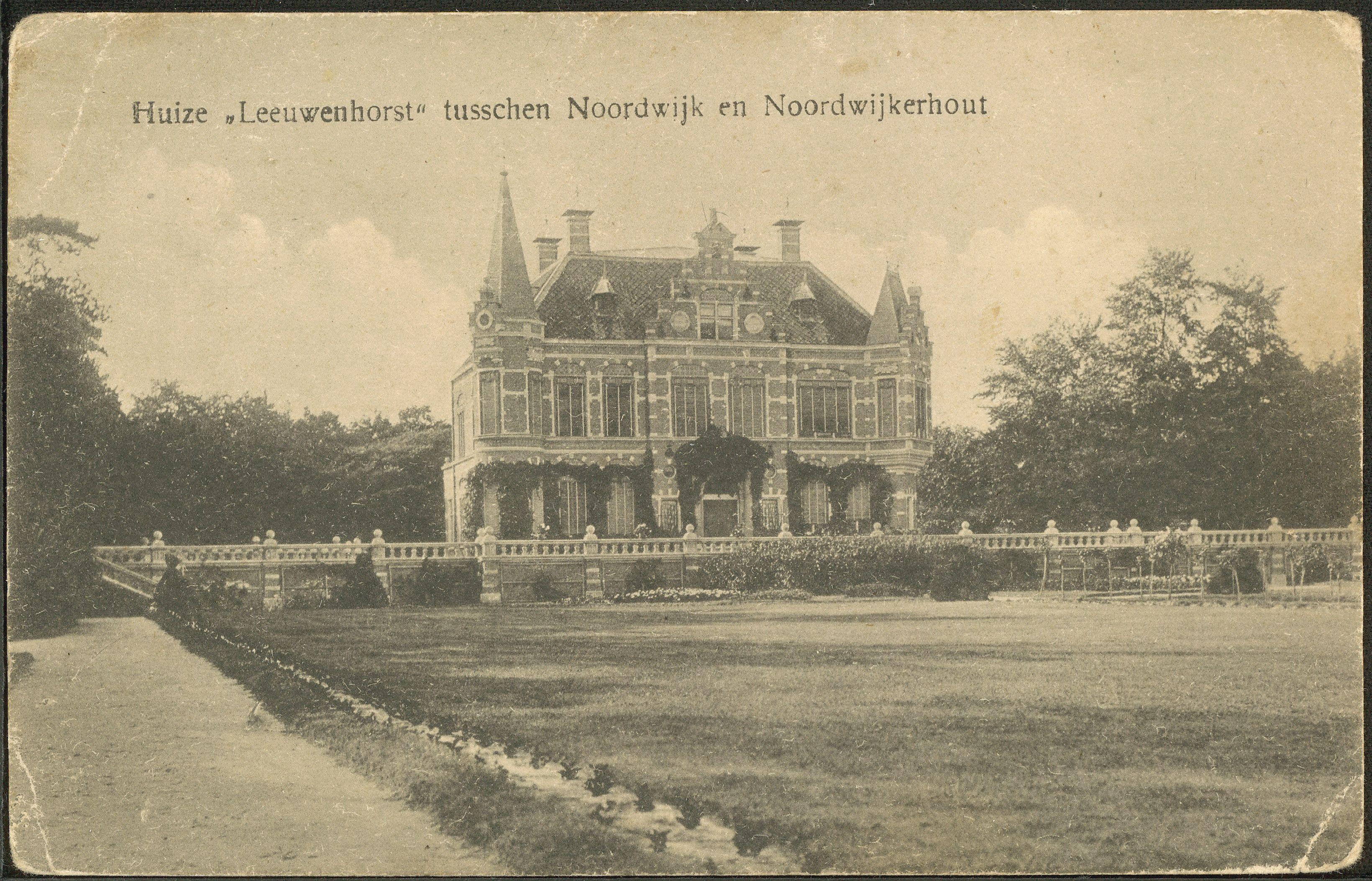 'Huize "Leeuwenhorst" tusschen Noordwijk en Noordwijkerhout'. Architect W.C. Mulder